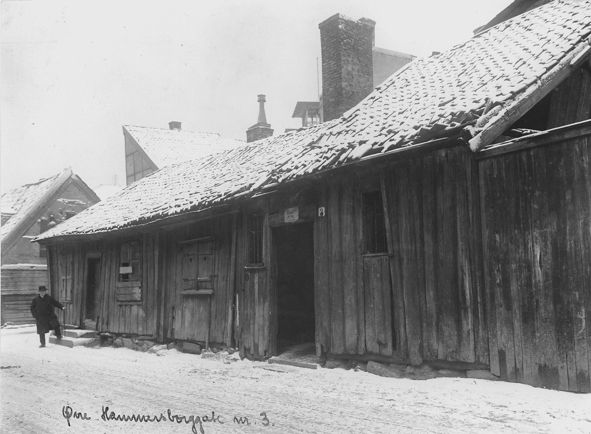 Øvre Hammersborggate 3. Foto: ANT/Oslo Museum, 1914.